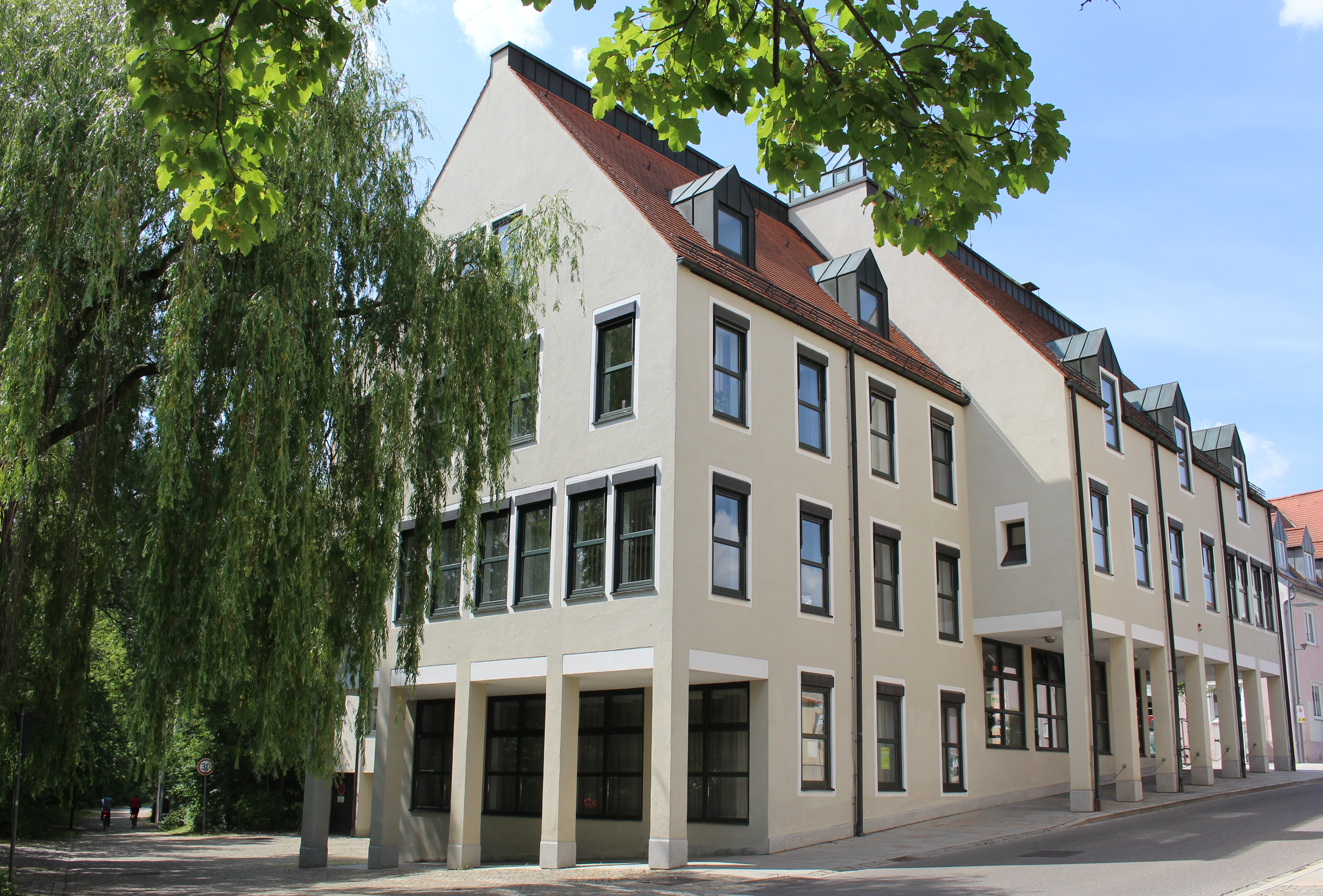 Rathaus des Marktes Pförring im Landkreis Eichstätt, Oberbayern